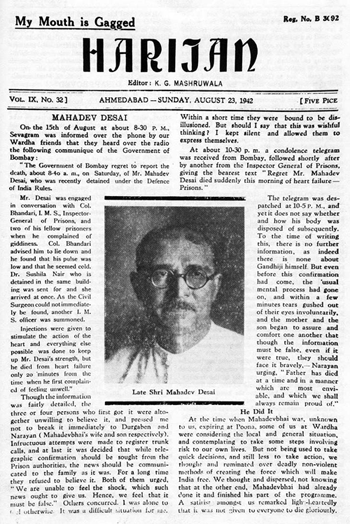 Harijan